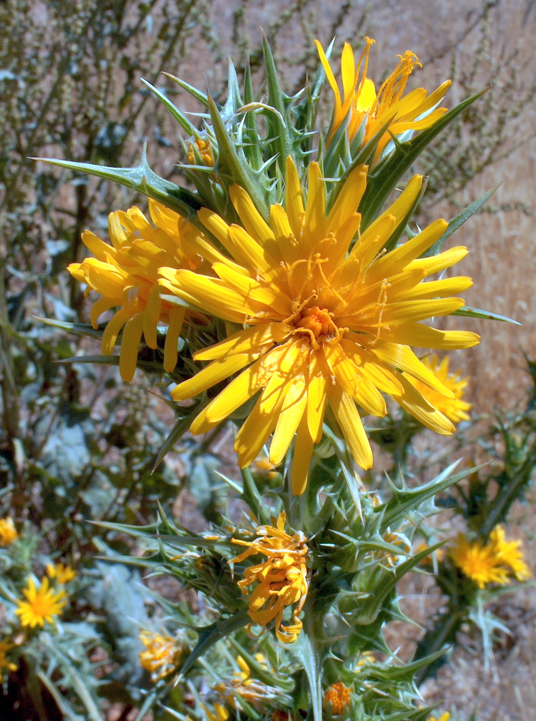 Scolymus hispanicus (Tagarnina) : Capítulos en flor - El Prado de Rejas, Madrid-Barajas (España).